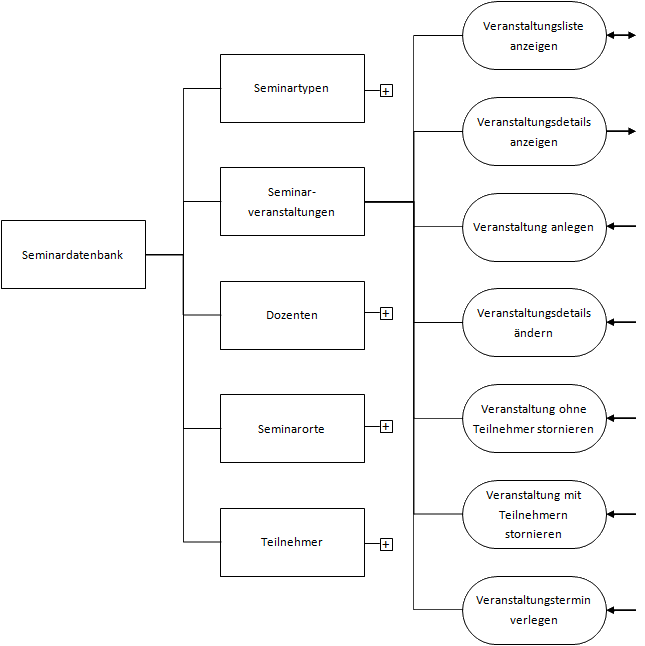 Beispiel eines Funktionalen Hierarchiebaums, wie er in der Function-Point-Analyse verwendet wird.